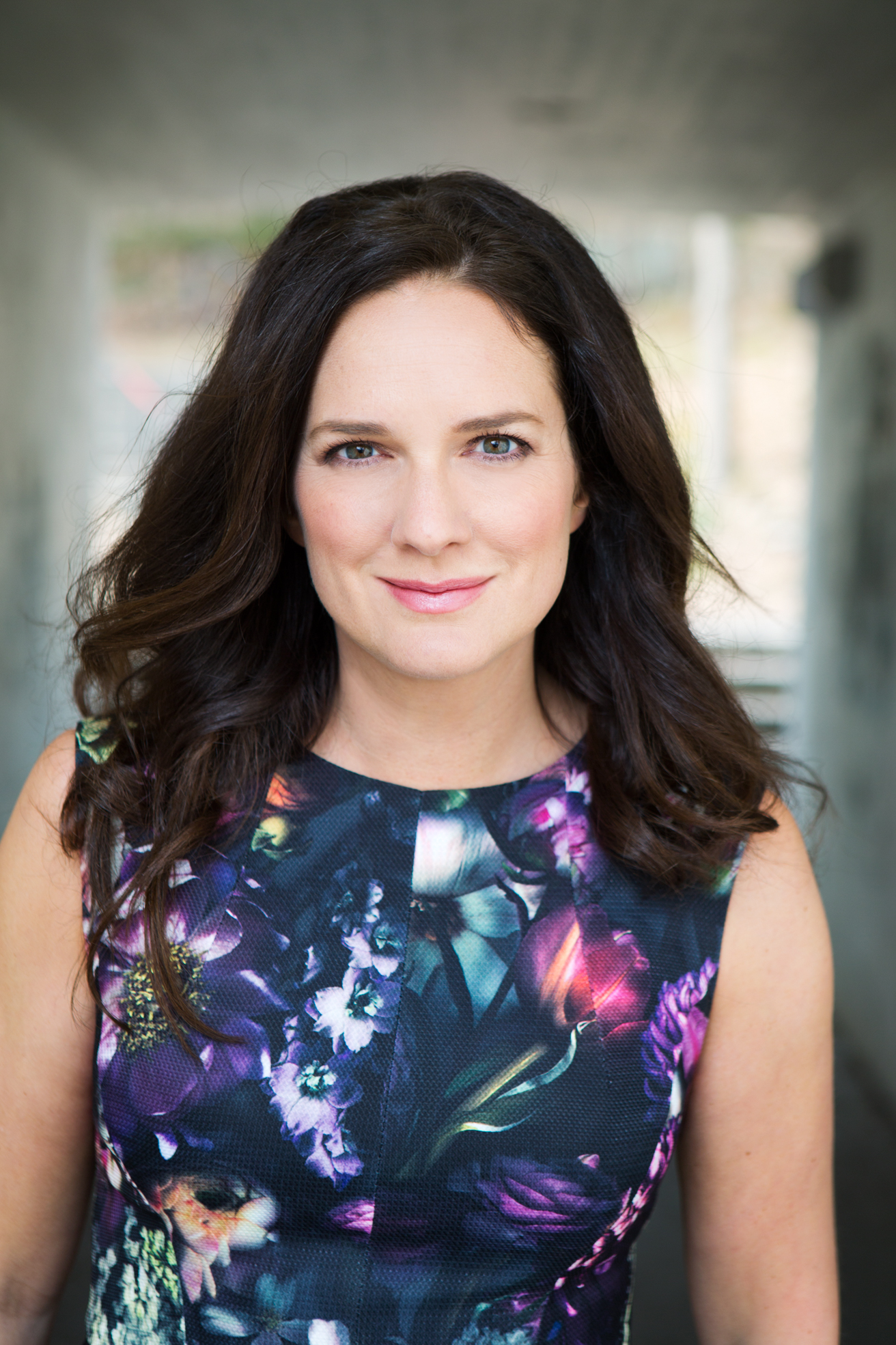 Författaren Sofie Sarenbrant.